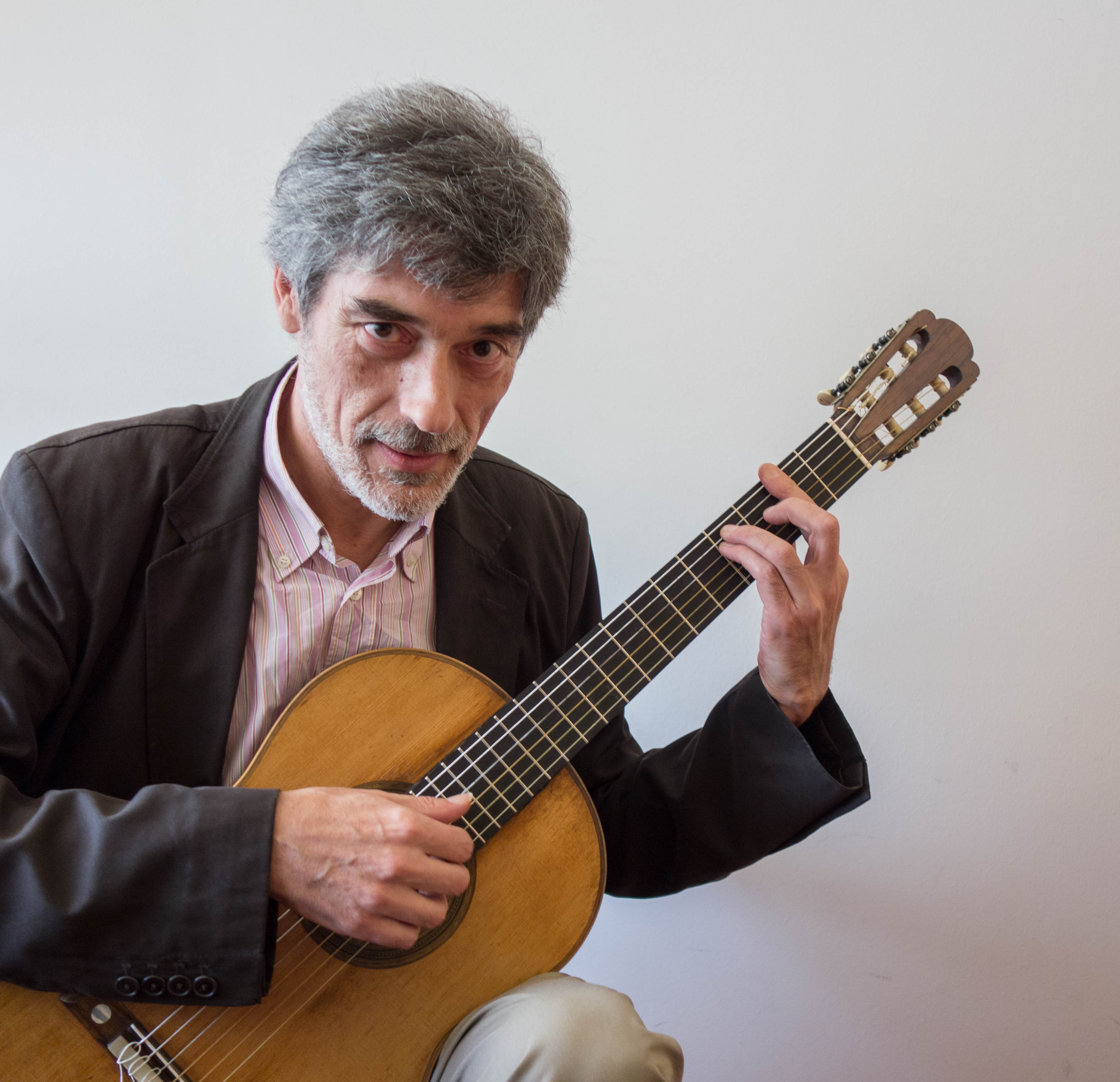 Carles Trepat, guitarrista